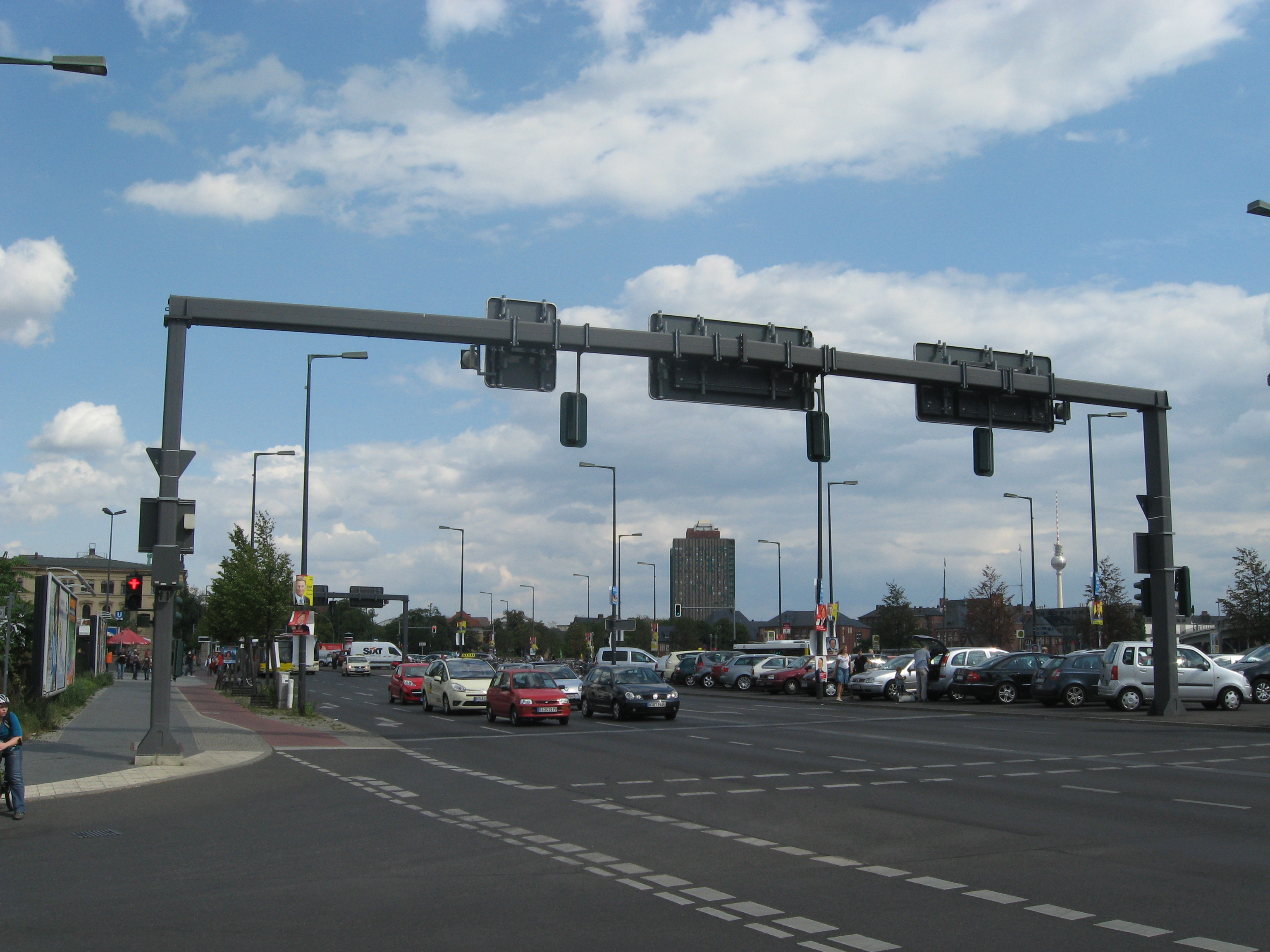 Kreuzung am Europaplatz nahe dem Berliner Hauptbahnhof